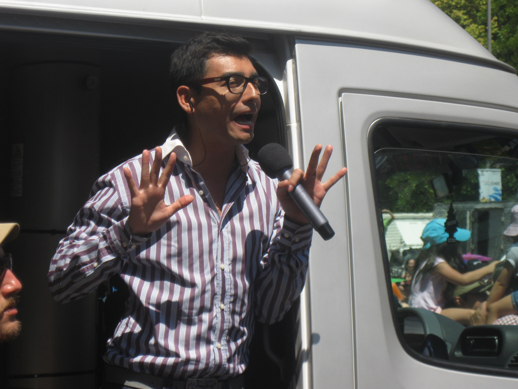 El periodista chileno Andrés Caniulef en el año 2010, cuando era parte de Canal 13.